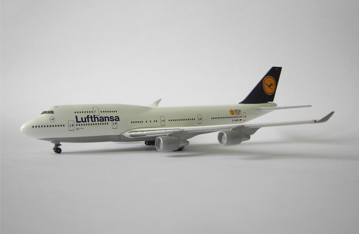 Lufthansa - Boeing 747-400 im Maßstab 1:500